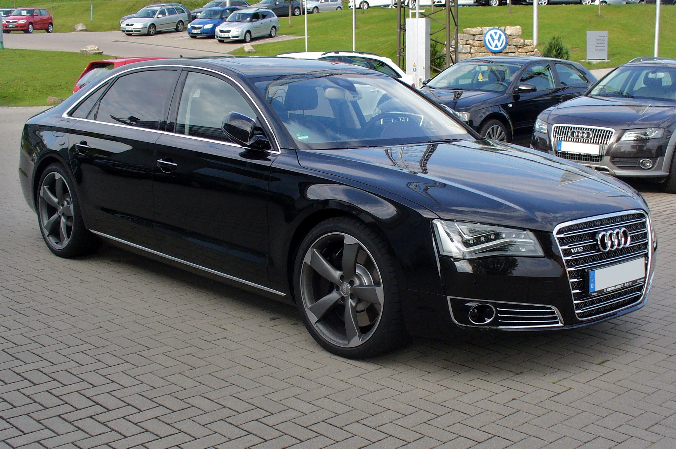 Audi A8 W12